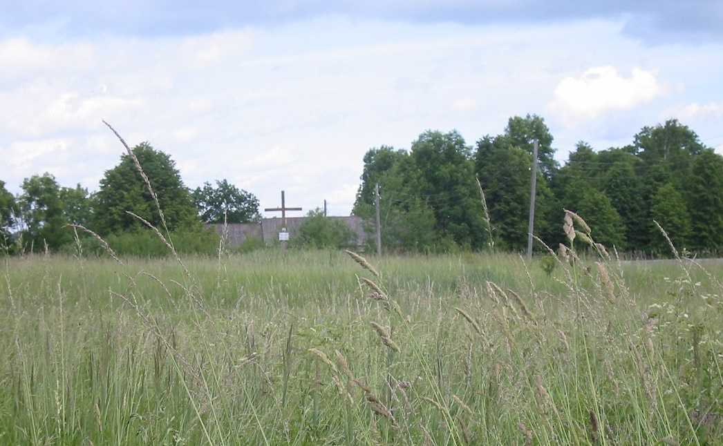 Fotografie des 1999 errichteten Erinnerungskreuzes für die Immanuelkirche im ehemaligen Schirwindt (Kutosowo)